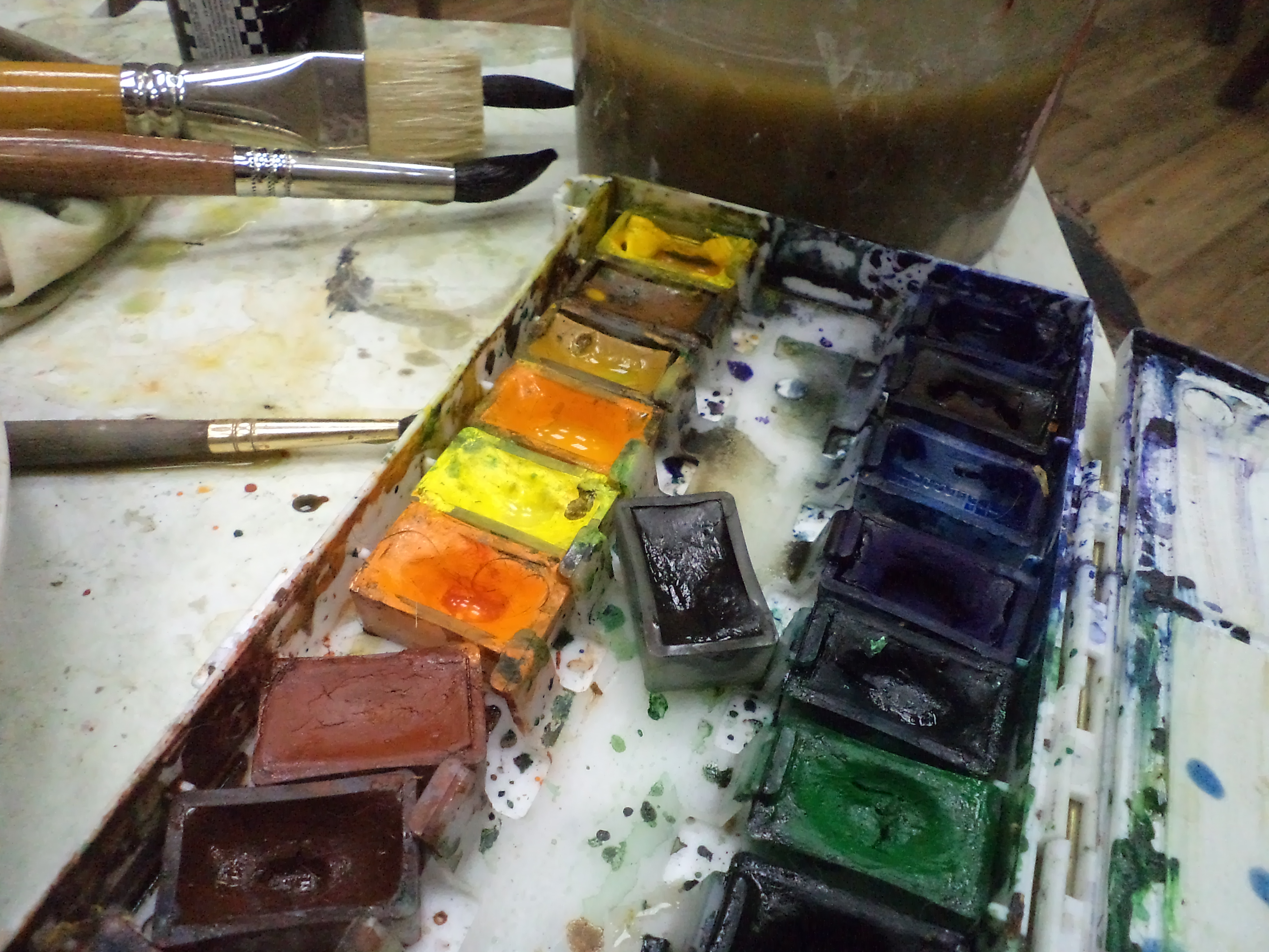 фото, Акварель, красик, кисти